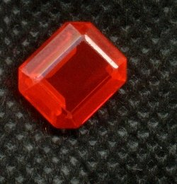 Rubi sintético lapidado (0,8 x 1,4 cm)